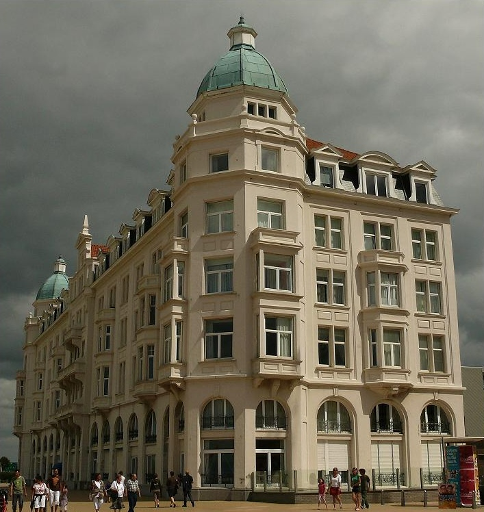 L'imposant hôtel Palace fut inauguré en 1914 pour le confort